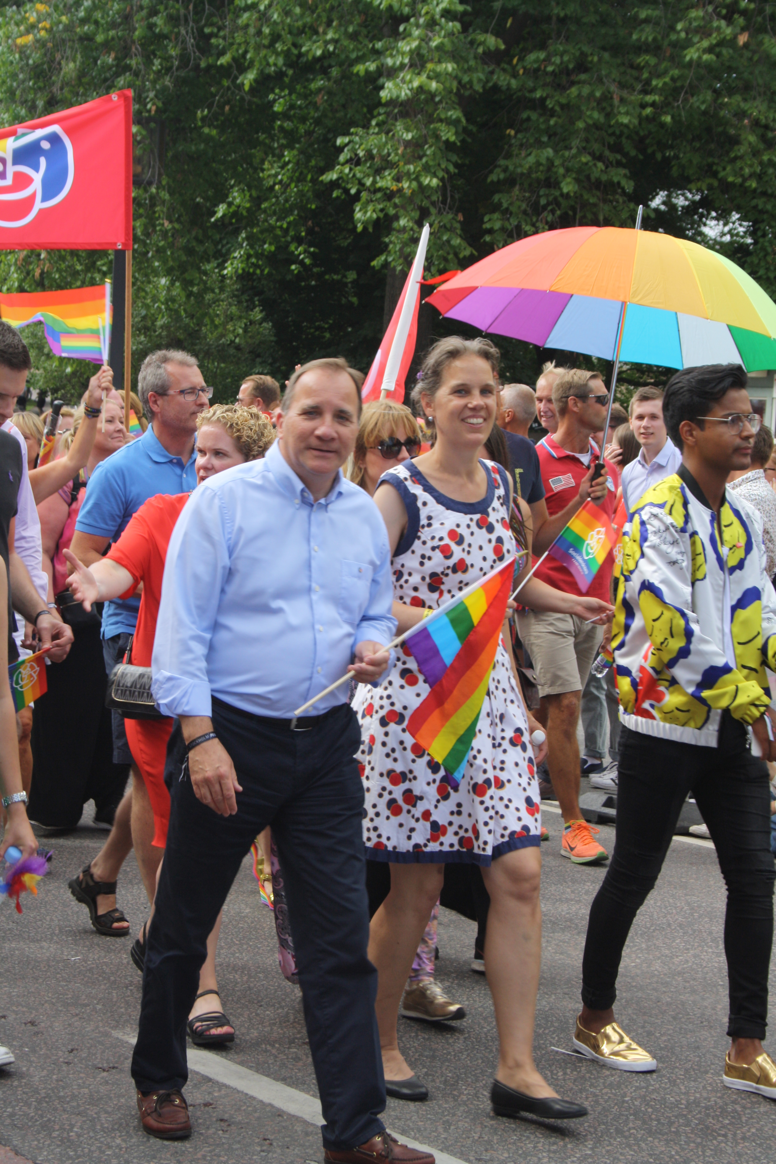 Stefan Löfven på Stockholm Pride 2016